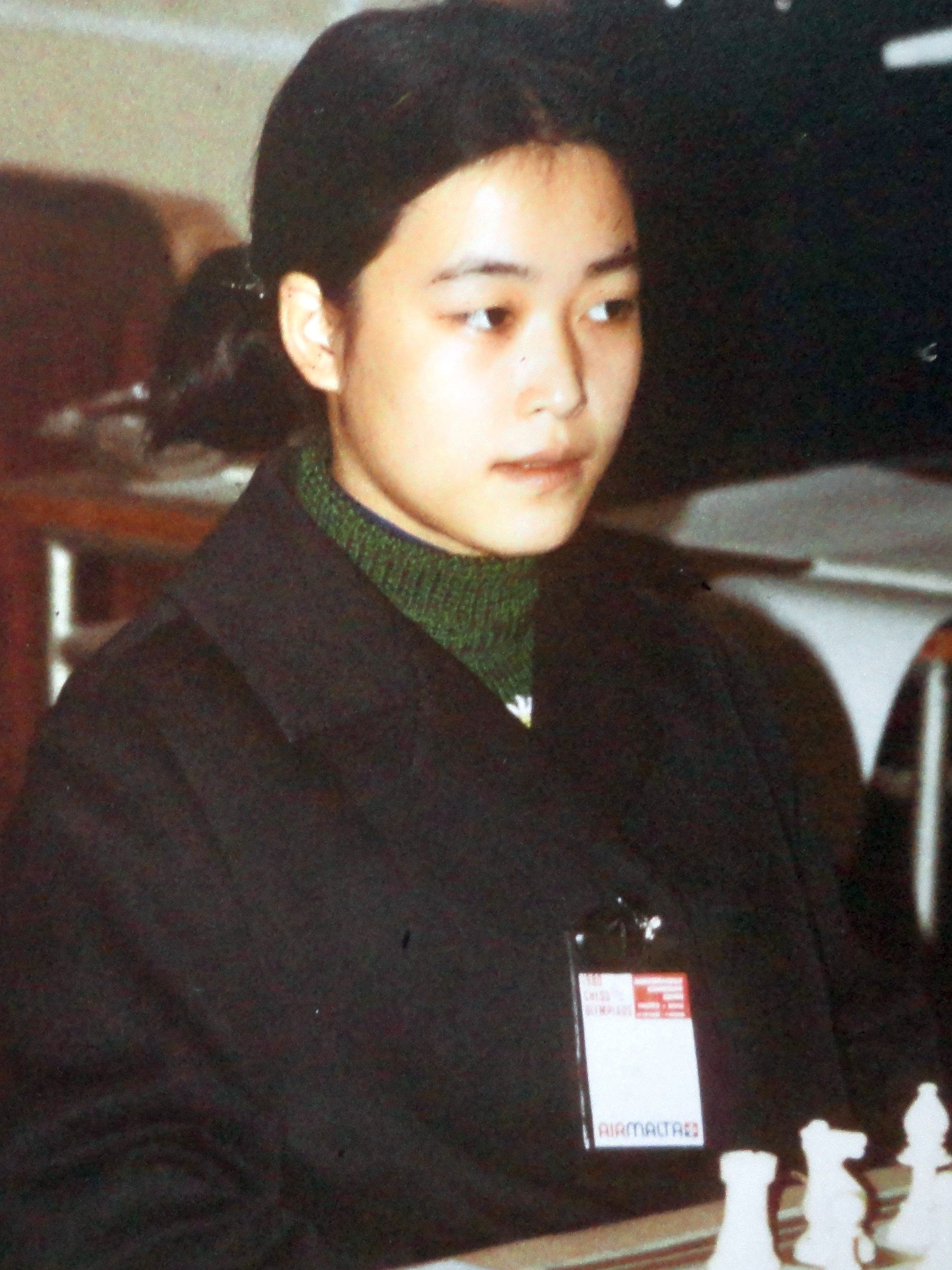 Liu Shilan, Schacholympiade 1980 in Valletta auf Malta.